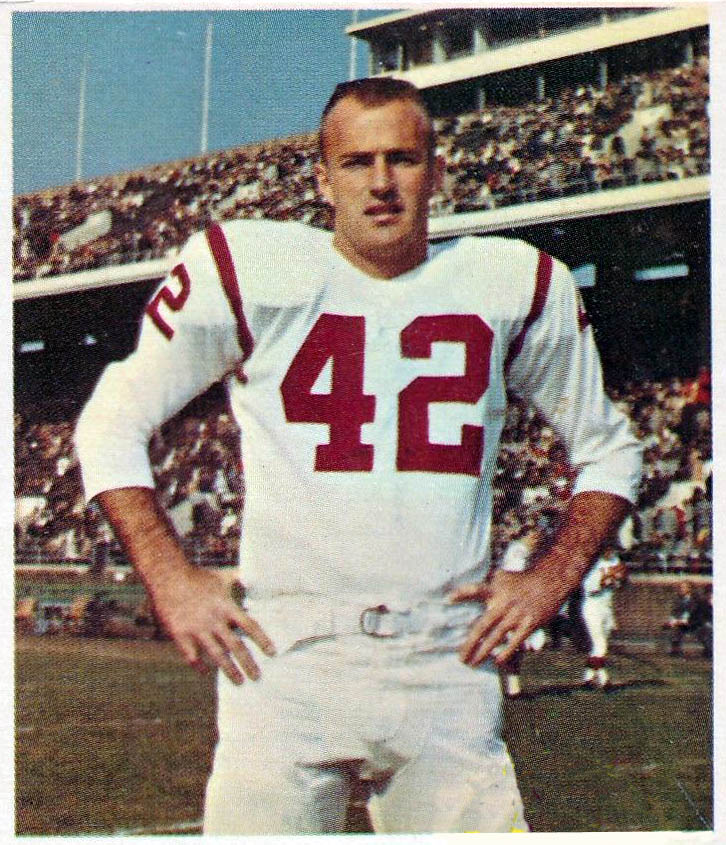 1961 Fleer Wallet Pictures n°4: Bill Anderson